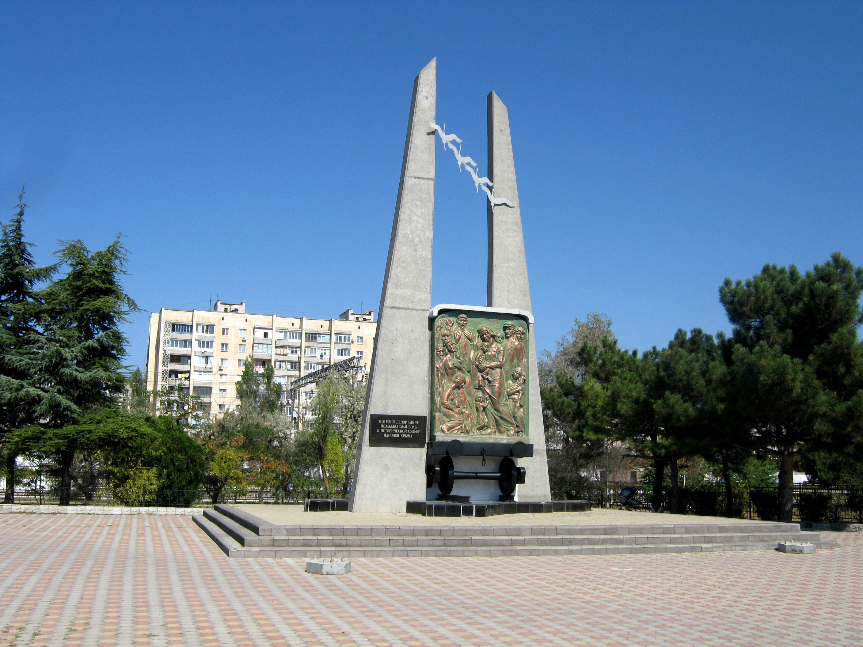 Монумент депортации крымских татар в Евпатории